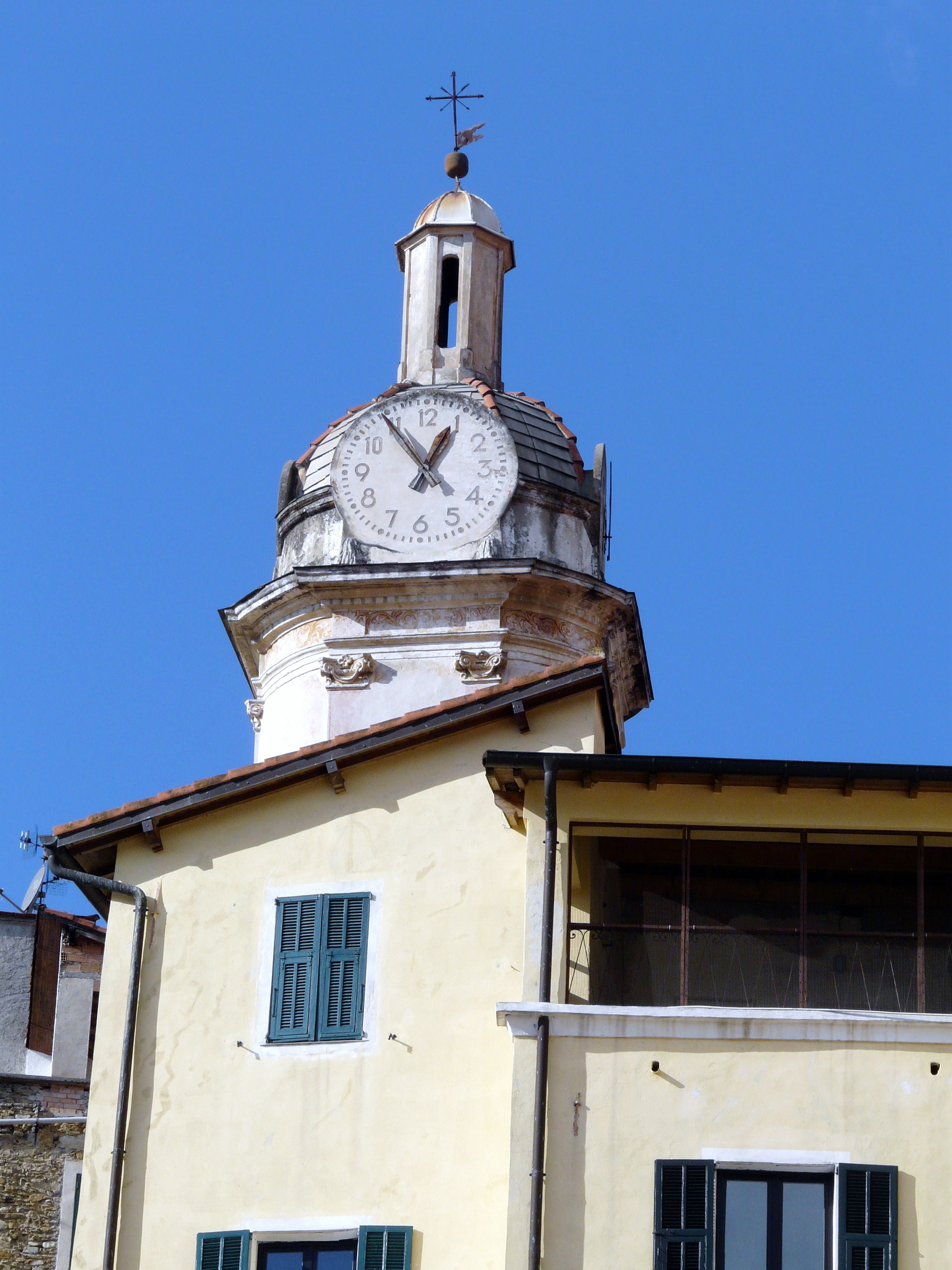 Campanile della chiesa dei Santi Fabiano, Sebastiano e Biagio, San Biagio della Cima, Liguria, Italia